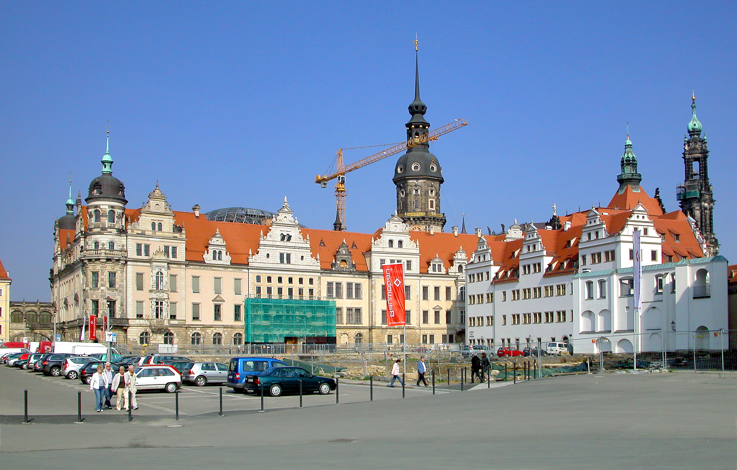 26.04.2008 01067 Dresden-Mitte, Schloßstraße / Kanzleigasse: Blick von Südosten vom Jüdenhof über das Grabungsfeld Neumarkt Quartier VIII, zum Residenzschloß, Süd- und Ostflügel (GMP: 51.052622,13,737051), sowie rechts zur Südfassade des Kanzleihauses (GMP: 51.052612,13.738129). Diese Sichtbeziehung wird bald verbaut sein. Das ursprüngliche Kanzleihaus am Residenzschloß wurde 1665 - 1567 von Hans Irwisch erbaut und 1945 kriegszerstört. Von 1997 bis 1999 wurde das neue, nun 'Haus der Kathedrale' genannte, Gebäude errichtet. Es ist Sitz des Bischofs von Dresden-Meißen und des Domkapitels sowie Gemeindezentrum der Dompfarrei. [DSCN32344.TIF]20080426060DR(c)Blobelt